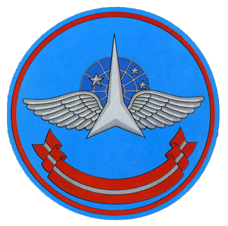 Нарукавная нашивка